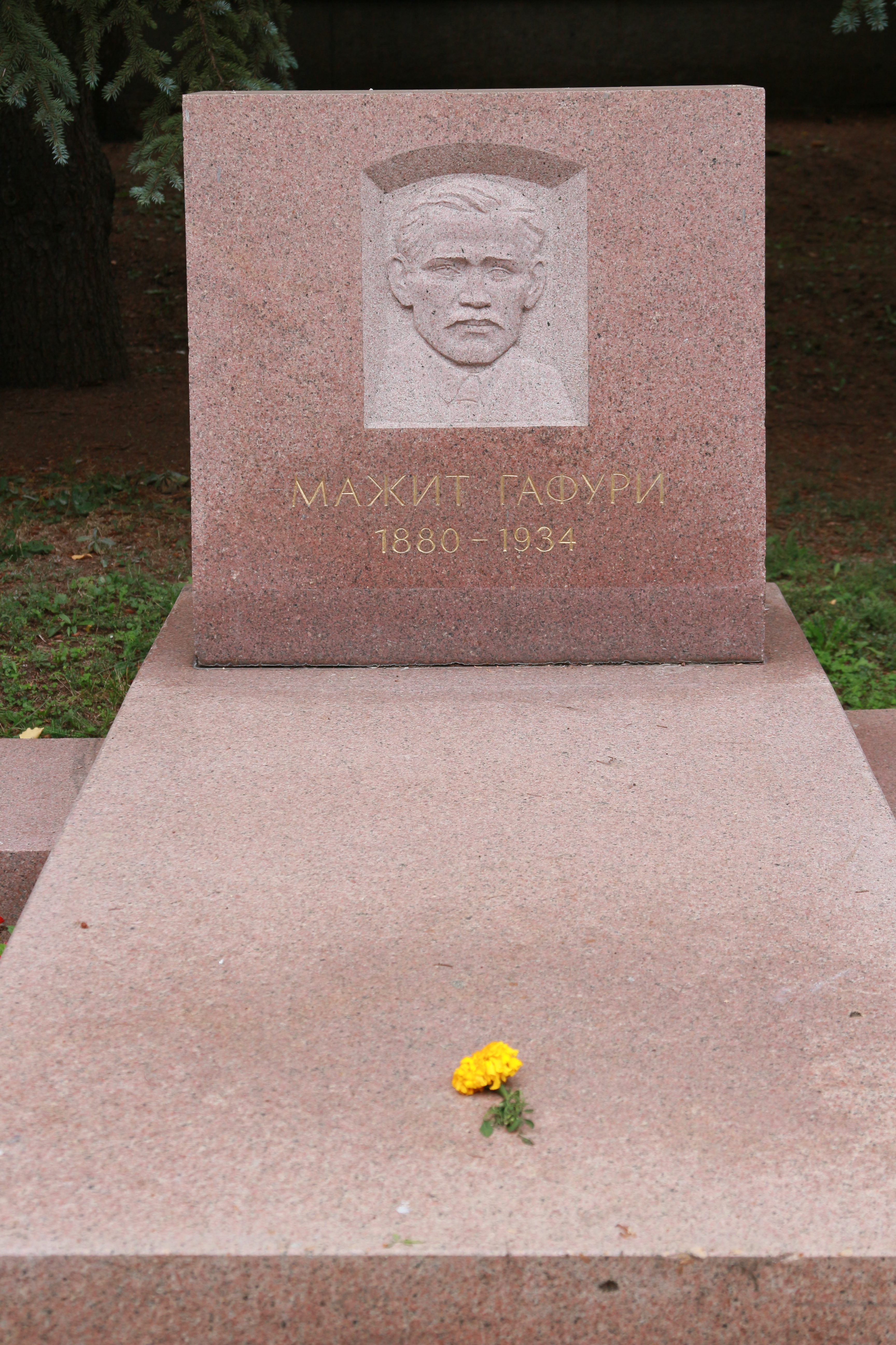 Могила Гафури Мажита, поэта: парк имени Ленина, Уфа, Башкортостан